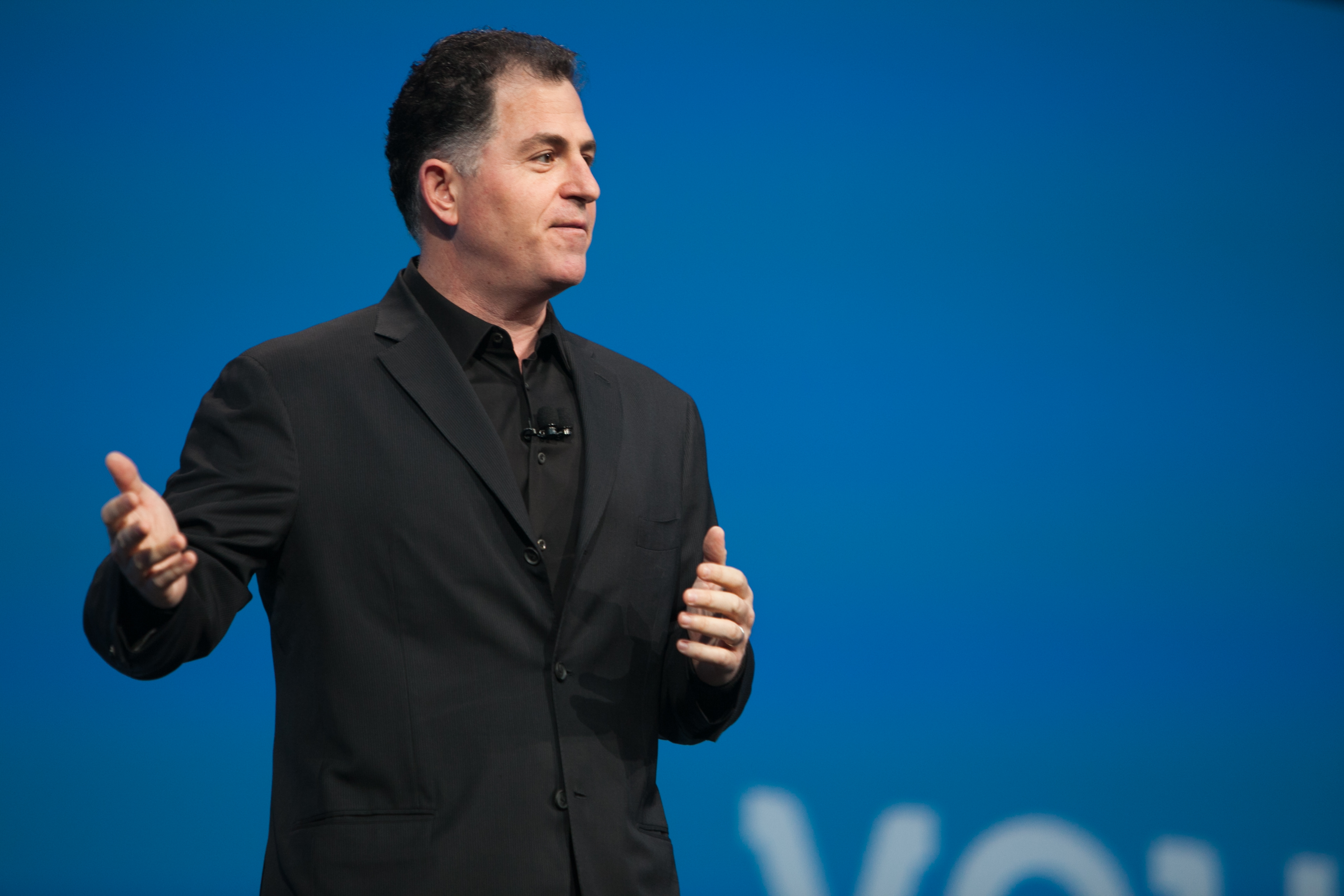 Michael Dell 2011